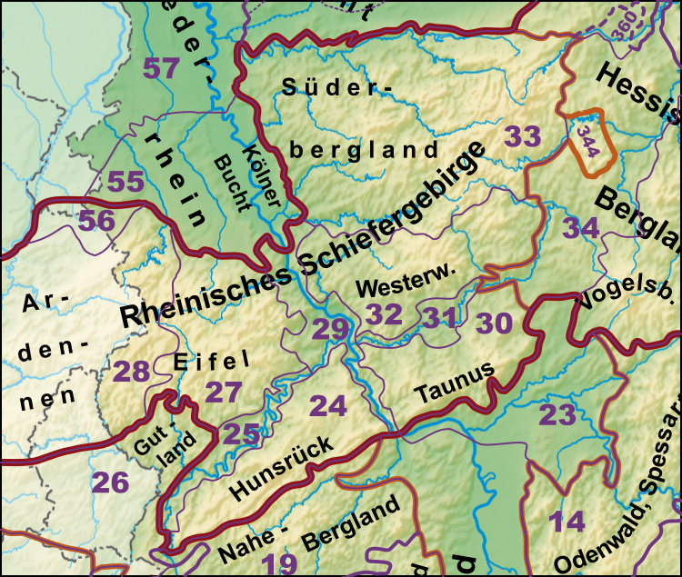 Haupteinheitengruppen des Rheinischen Schiefergebirges Für Naturraumboxen bitte die breitere Version (s. u.) nutzen!